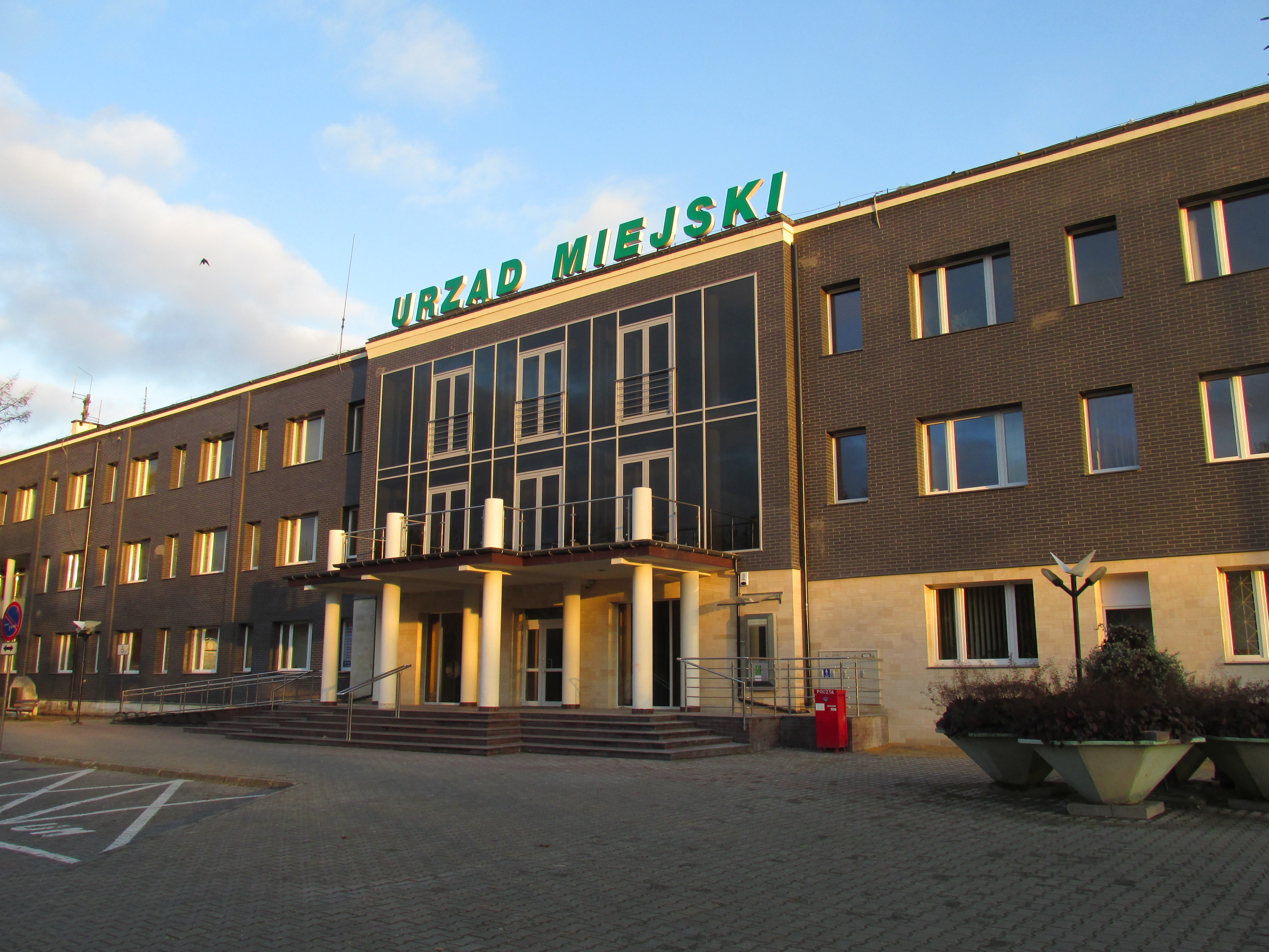 Budynek znajduje się w Centrum Miasta